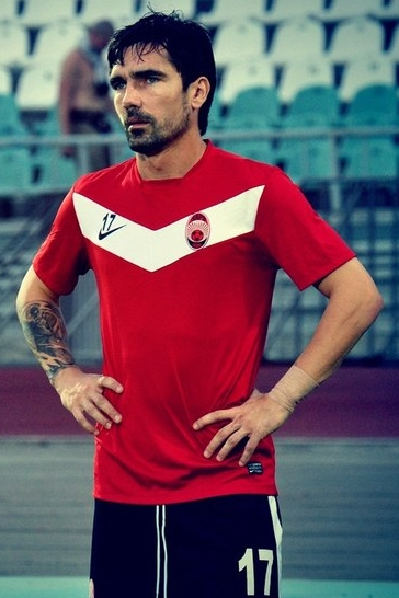 Никола Игнатьевич — сербский футболист.